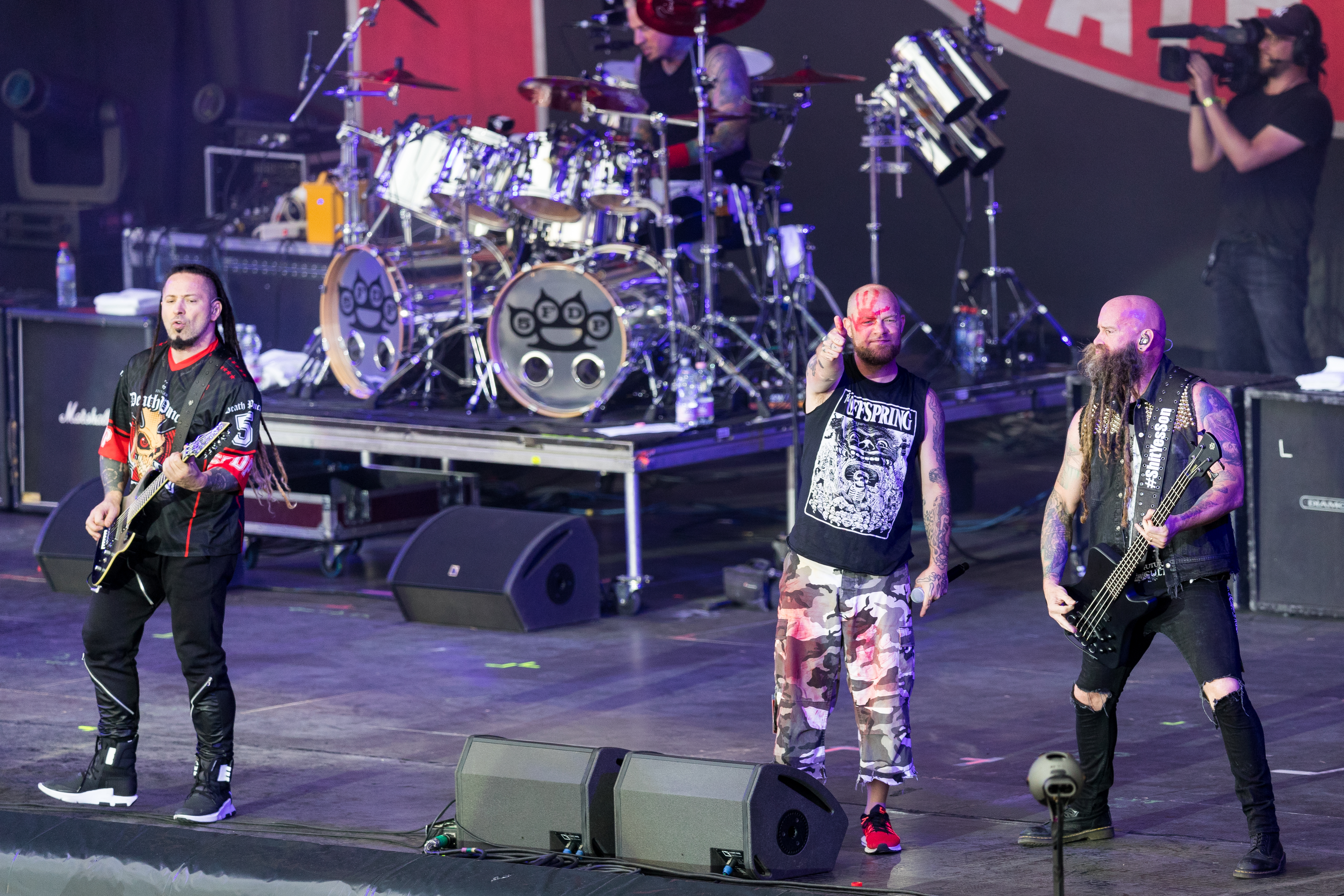 Five Finger Death Punch during Rock am Ring at Nürburgring, Nürnburg, Rheinland Pfalz, Germany on 2017-06-02, Photo: Sven Mandel